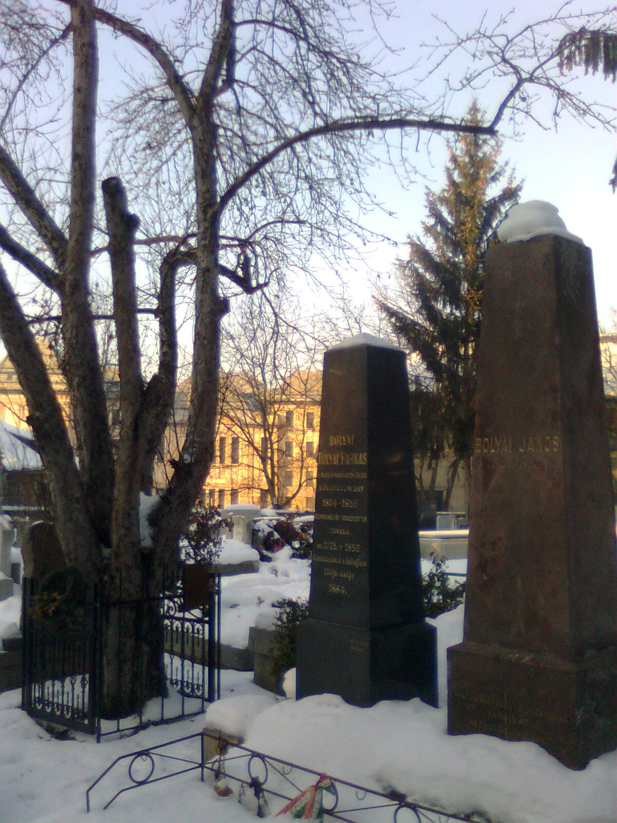 Bolyai Farkas és Bolyai János sírja a marosvásárhelyi református temetőben